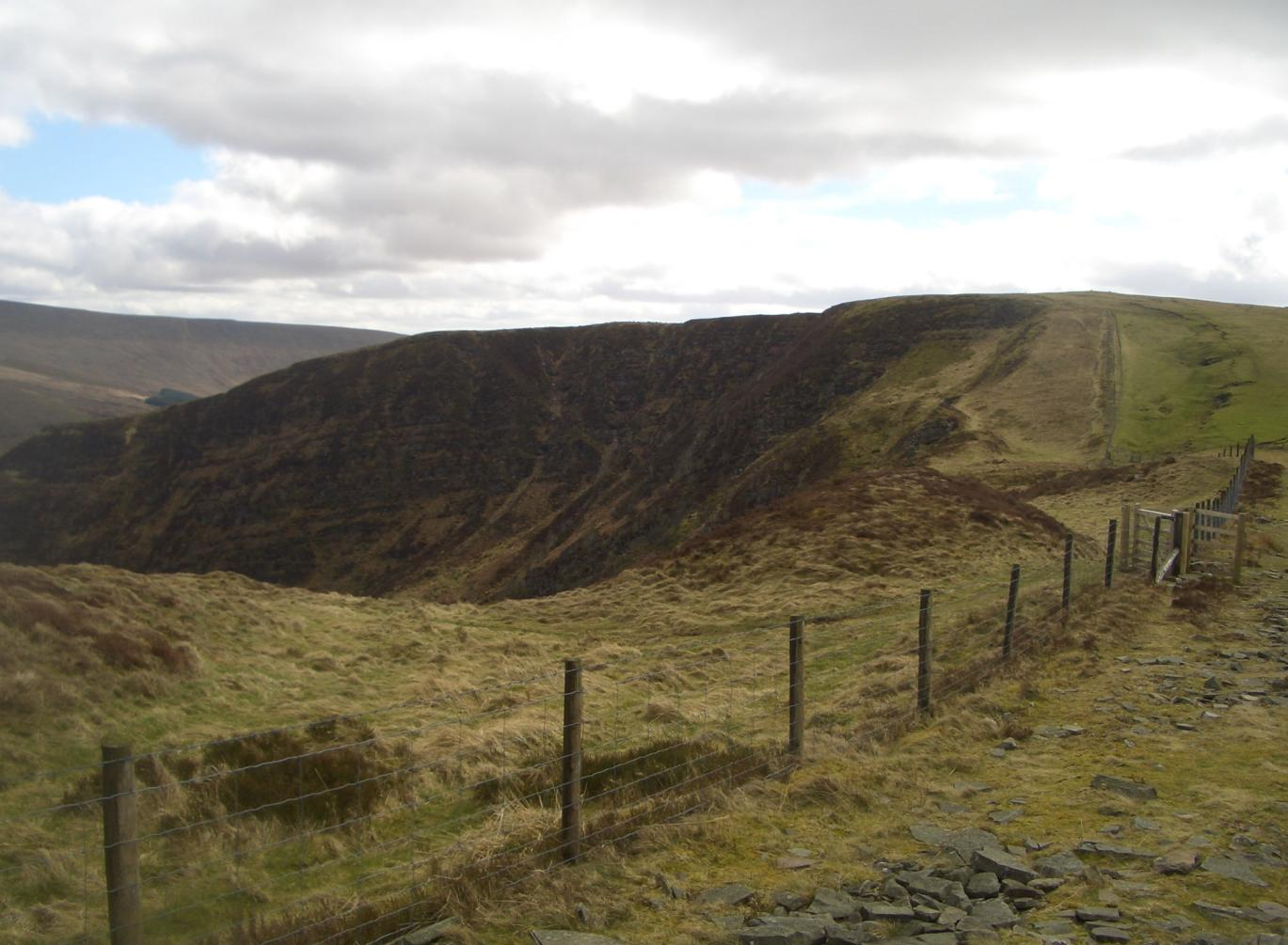 craig cerrig gleisiad